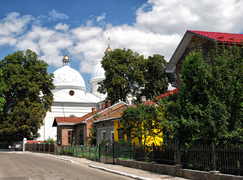 Церква Різдва Пресвятої Богородиці